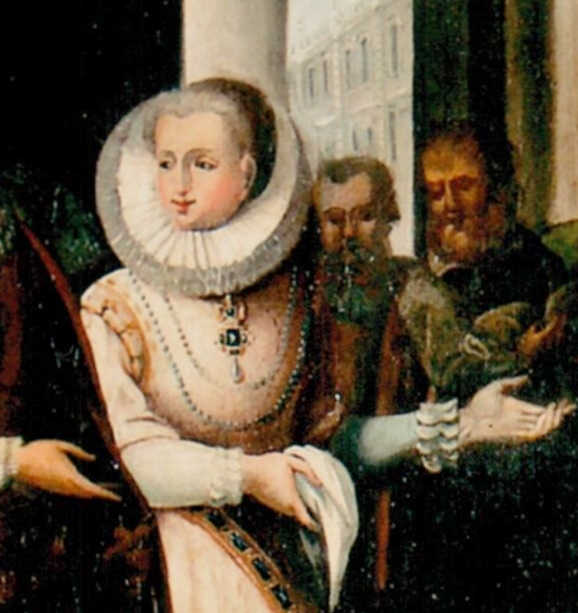 Particolare del quadro rappresentante Anna Lascaris di Tenda, conservato presso il Comune di Limone Piemonte